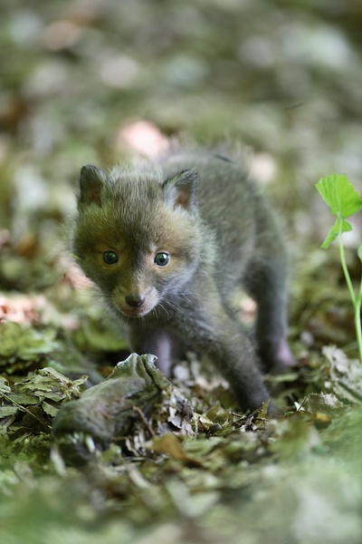 Rotfuchswelpe